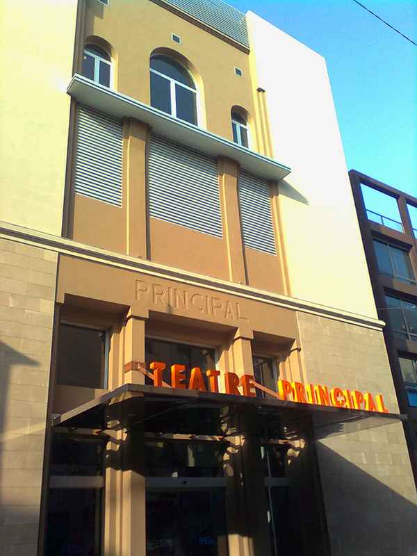 El Teatre Principal ja renovat, al carrer Francesc Layret.